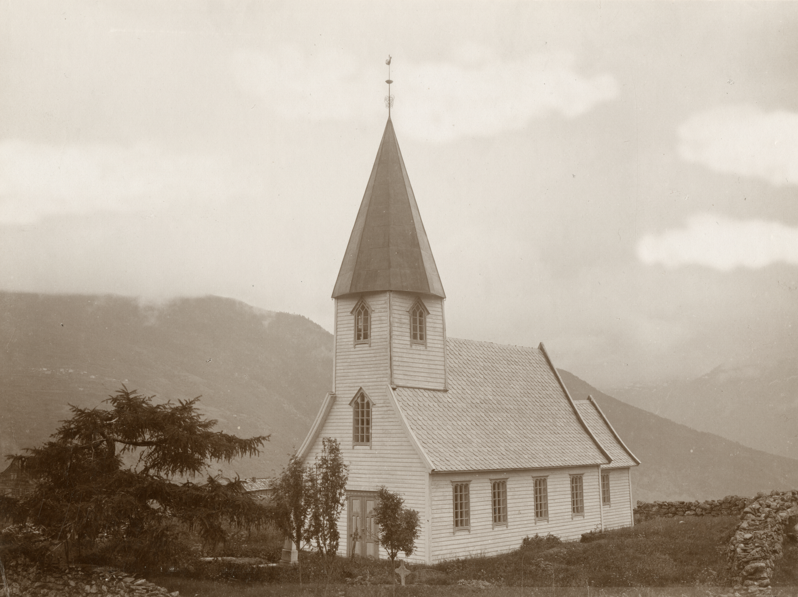 Joranger kirke i Fet, Sogn og Fjordane This image on crowdsourcing geotagging platform Fotodugnad